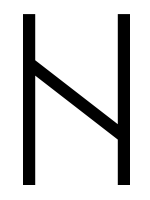 runic letter haglaz